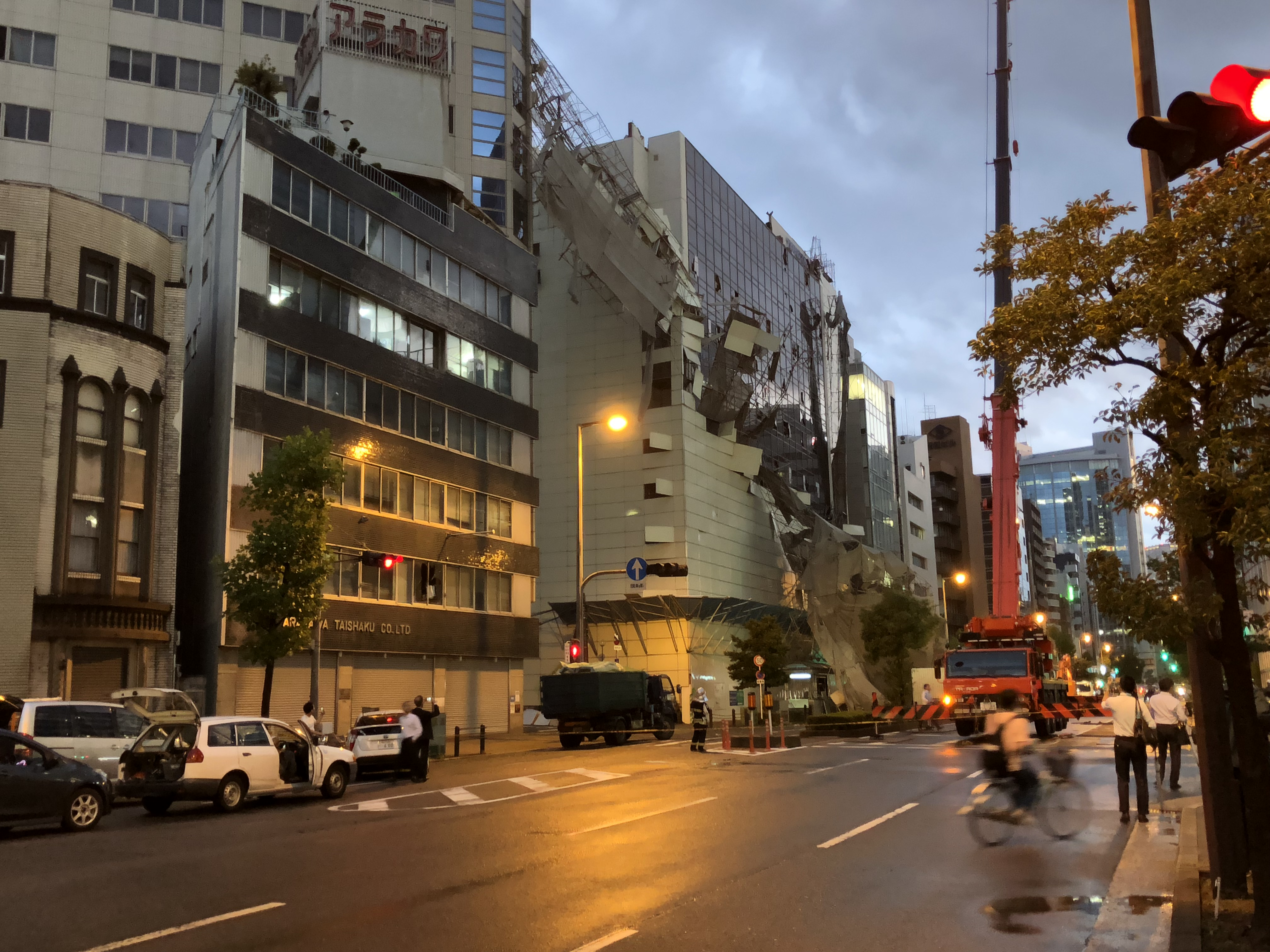 平成30年台風第21号で倒壊したビル解体現場の作業ja:足場（大阪市ja:西区 (大阪市)）